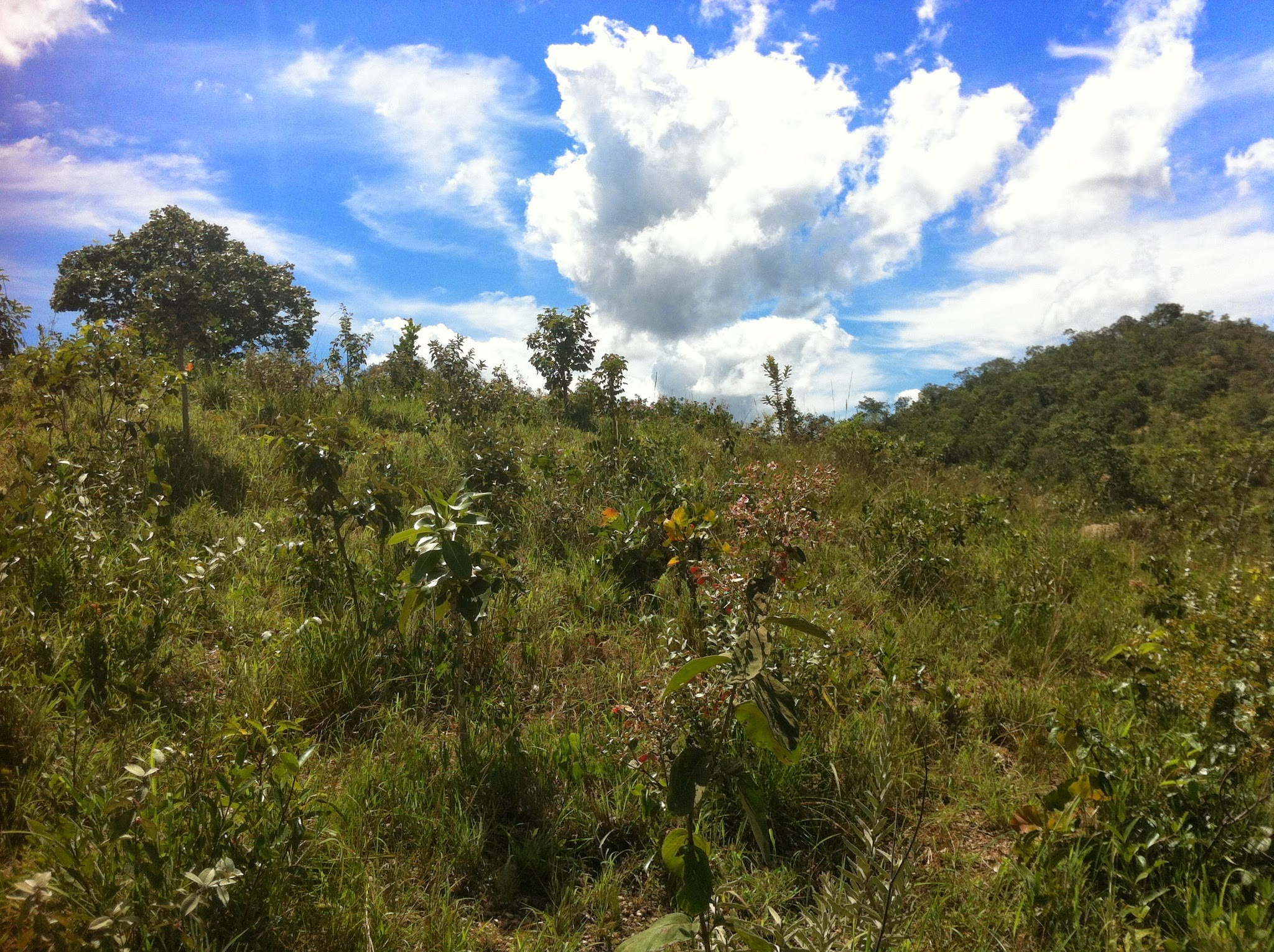 Cerrado